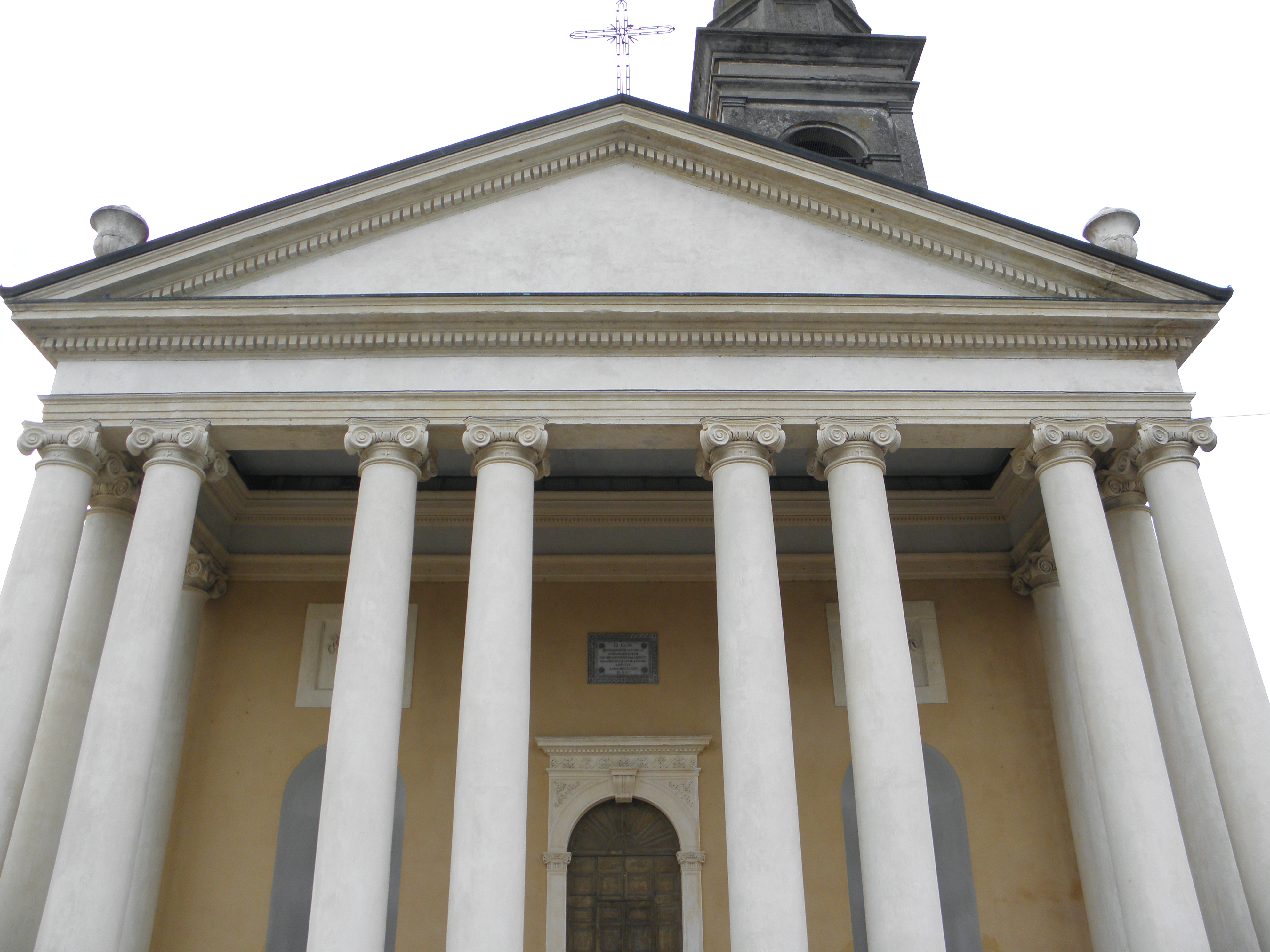 Isola Rizza, chiesa dei Santi Pietro e Paolo Apostoli.